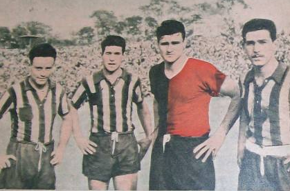 Partido del 14 de agosto de 1955, Rosario Central 1-Newell's 1. De izquierda a derecha: Alberto Cazaubón (RC), Oscar Massei (RC), Eduardo Bernardo (NOB), José Minni (RC).